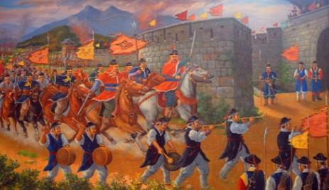 병사들을 지휘하여 남원성에 잠입하는 병마절도사 이복남